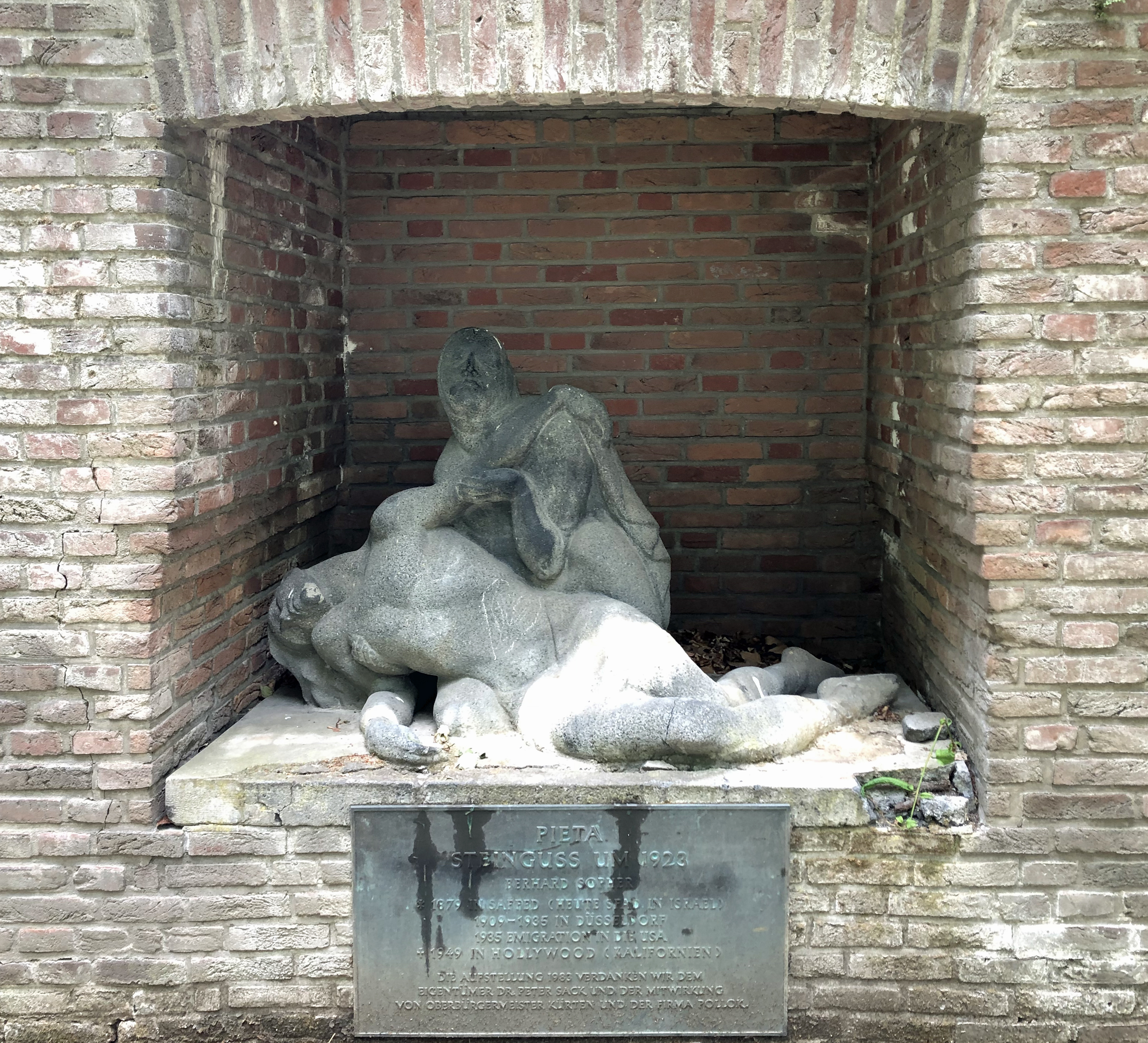 Pieta von Bernhard Sopher in Wandnische des Palais Spee, Düsseldorf-Carlstadt